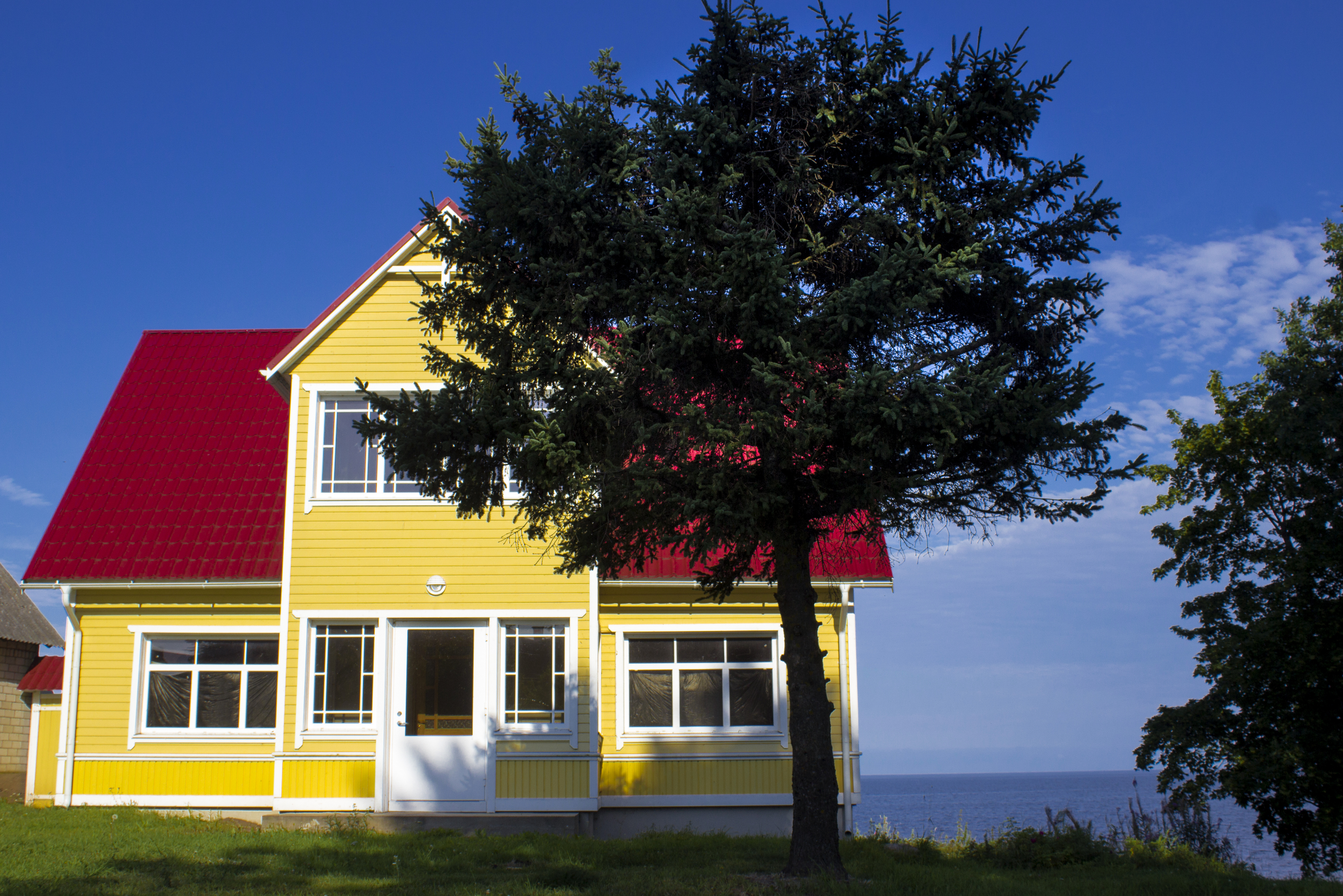 Kallaste